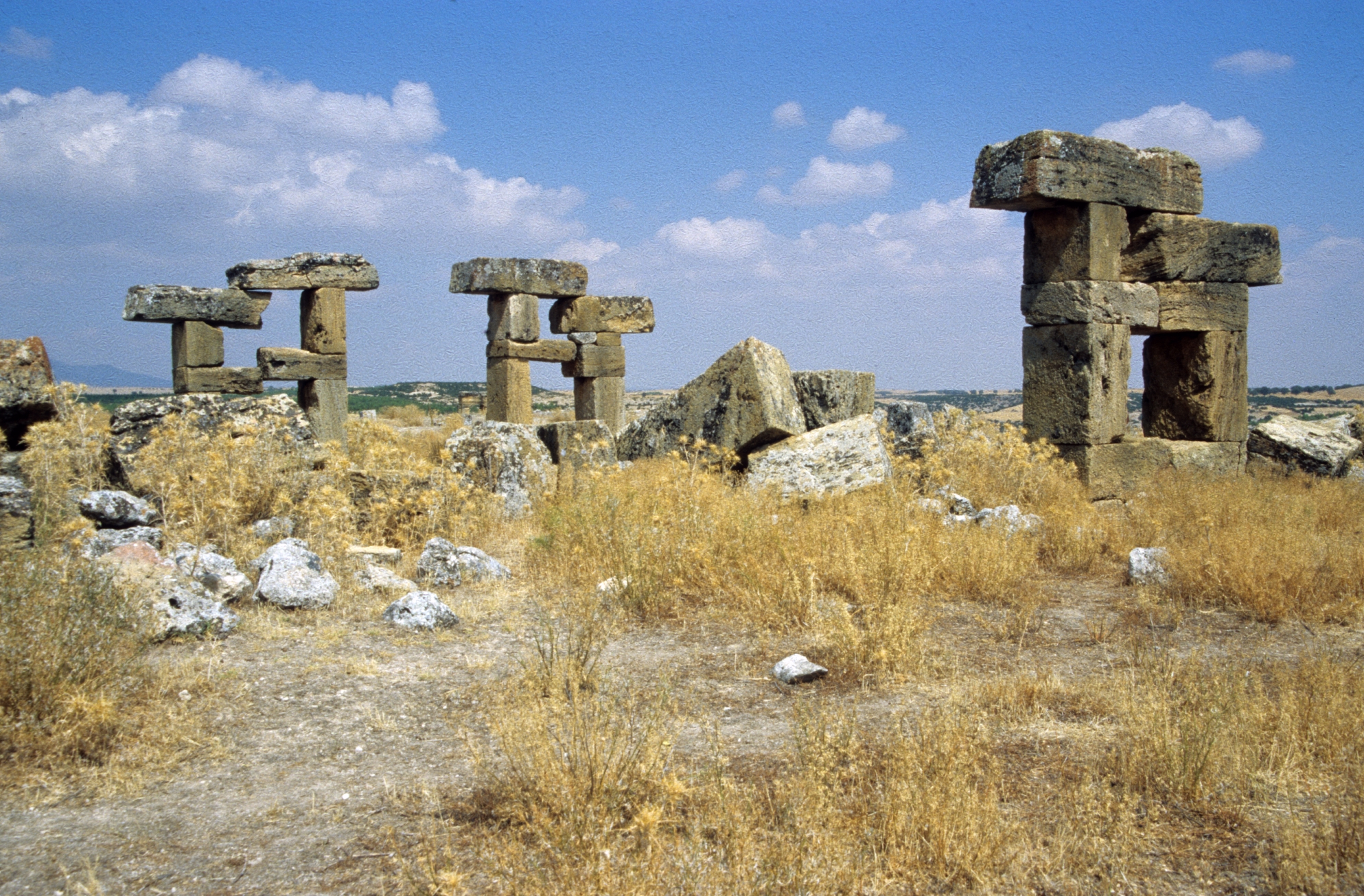 Steinfachwerk in Blaundos, Türkei, Provinz Usak